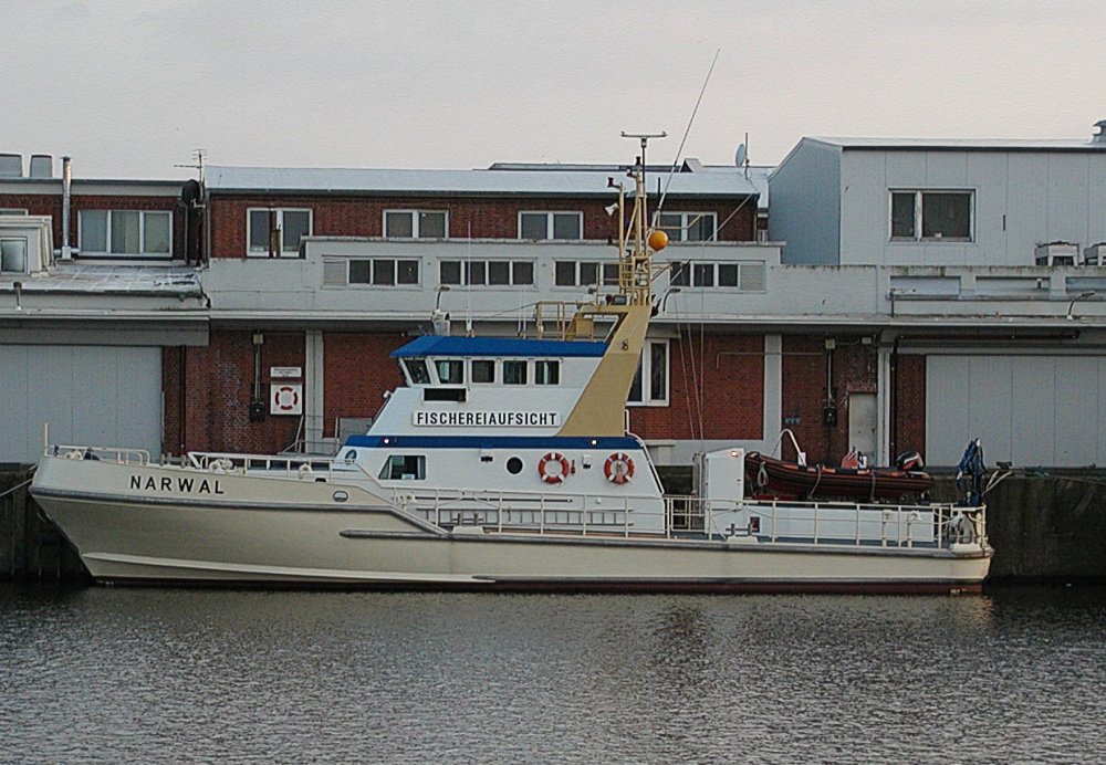 Das Fischreiaufsichtsschiff Narval im Hafen von Cuxhaven